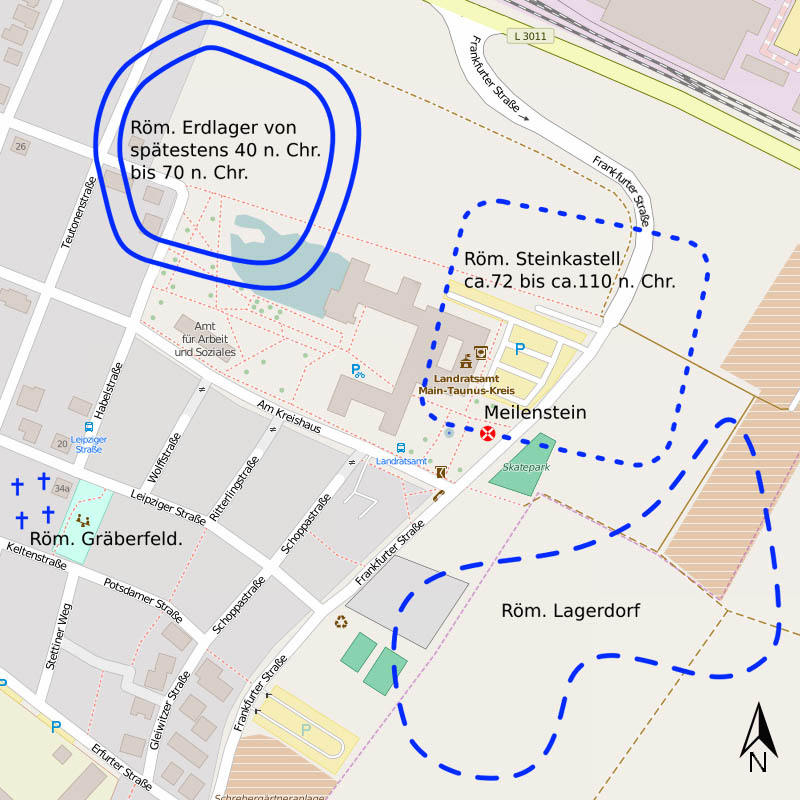 Das Landratsamt im Bereich der röm. Kastellanlagen auf dem Hochfeld in Hofheim am Taunus